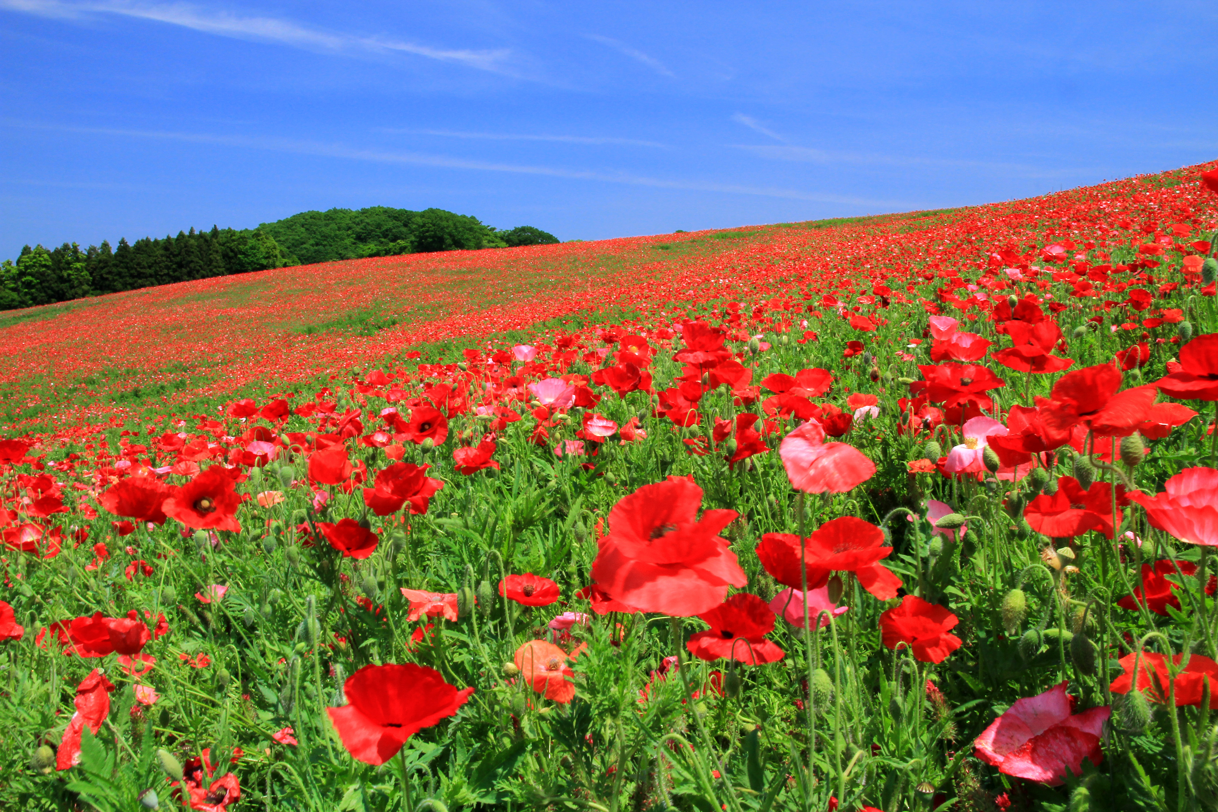 秩父高原牧場のシャーレーポピー（埼玉県秩父郡皆野町）